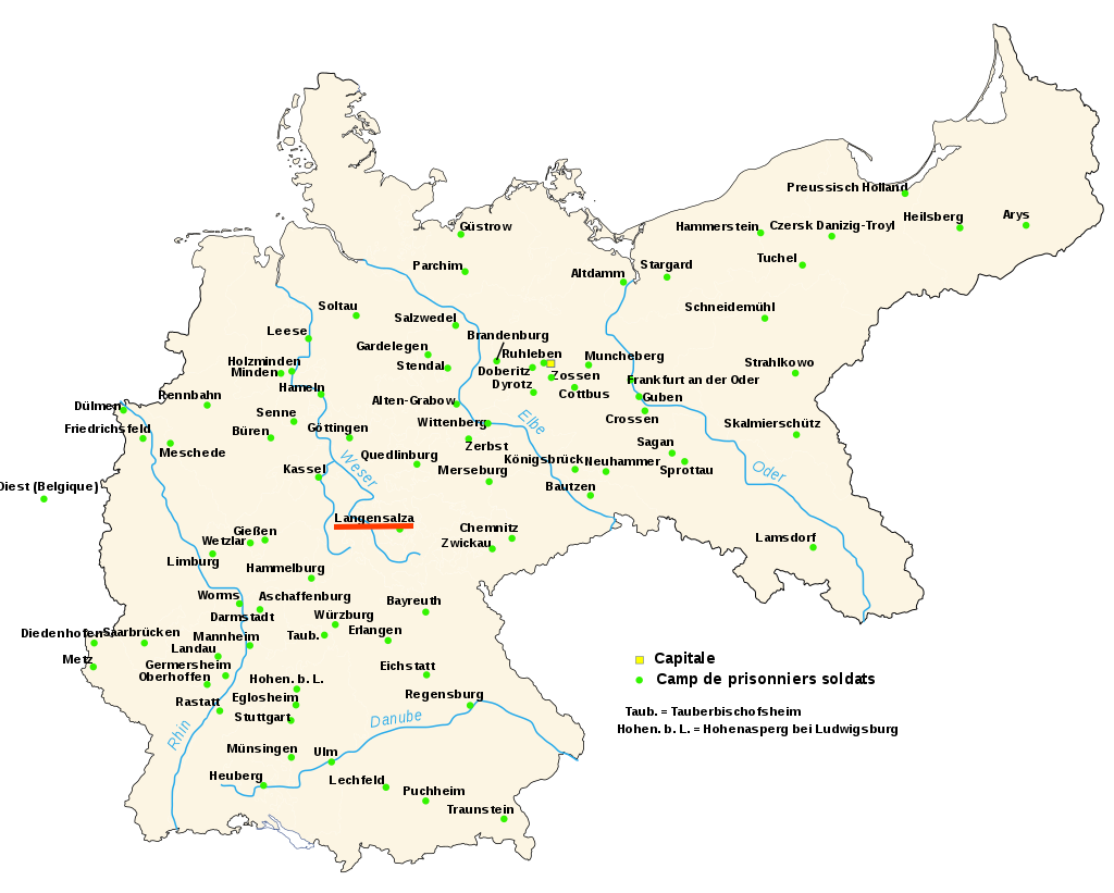 Carte desCamps de prisonniers soldats en Allemagneen 1914-1918. Langensalza